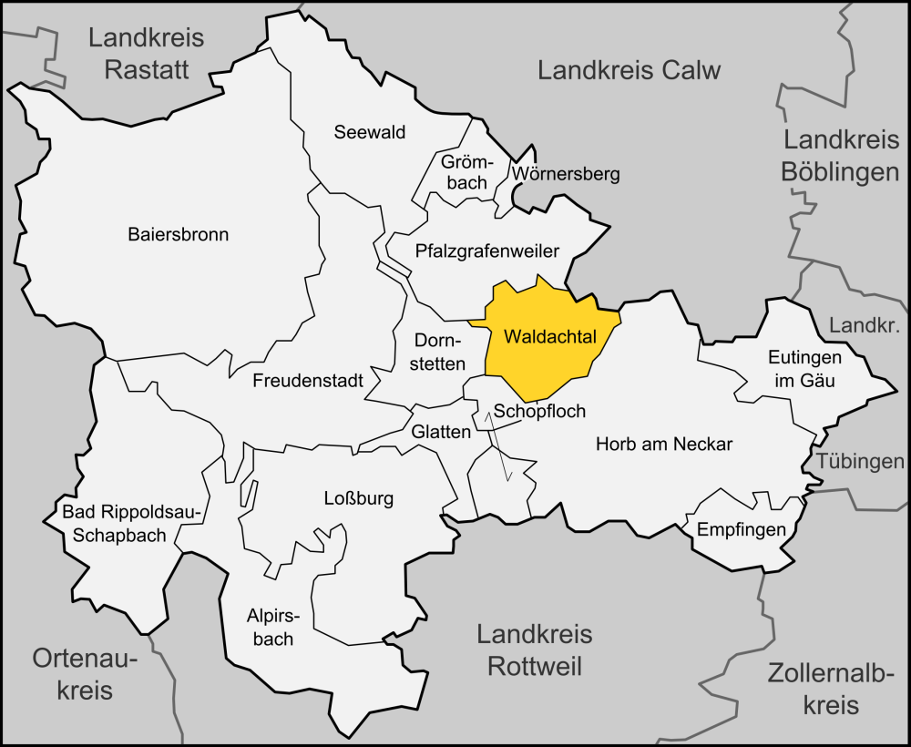 Karte der Gemeinde Waldachtal im Landkreises Freudenstadt